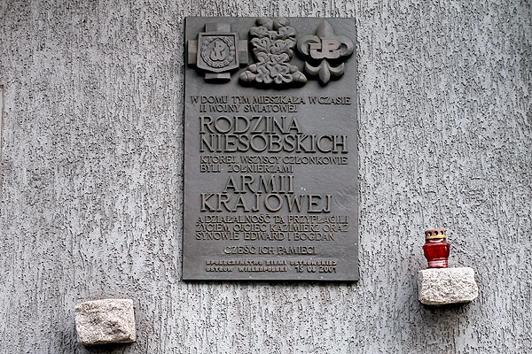 Tablica rodziny Niesobskich umieszczona na ścianie kamienicy przy ul. Wrocławskiej 33 w Ostrowie Wielkopolskim.